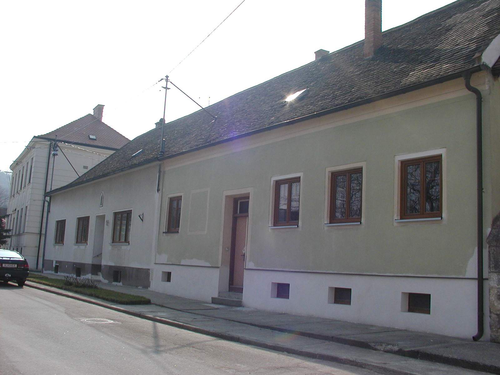 Sitzendorf Hauptplatz 12